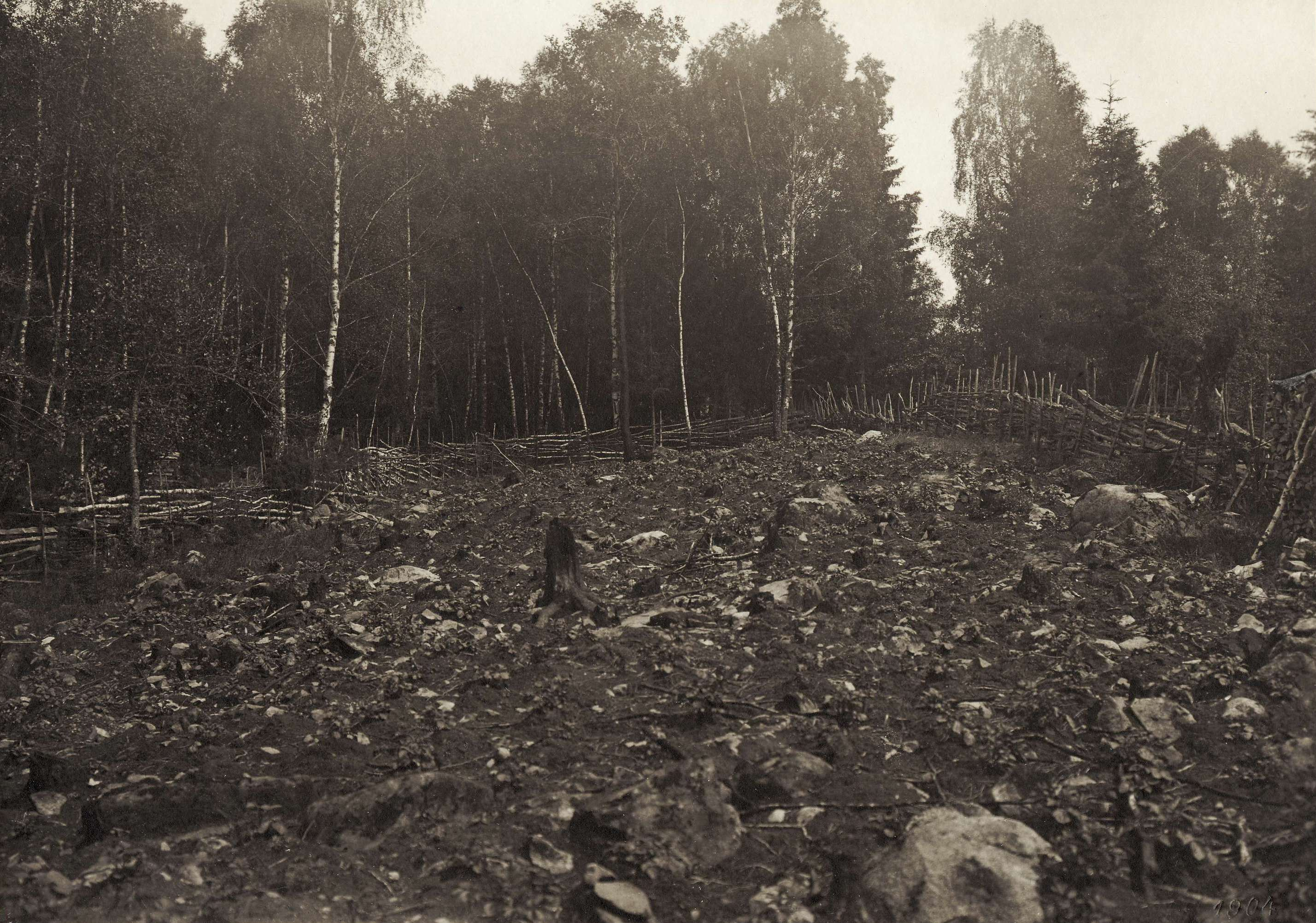 Skogsbruk, svedjebruk. Avbränd ”bråne”. Svedje tillhörande Anesgården i Slätafly, Torsås socken, Småland.